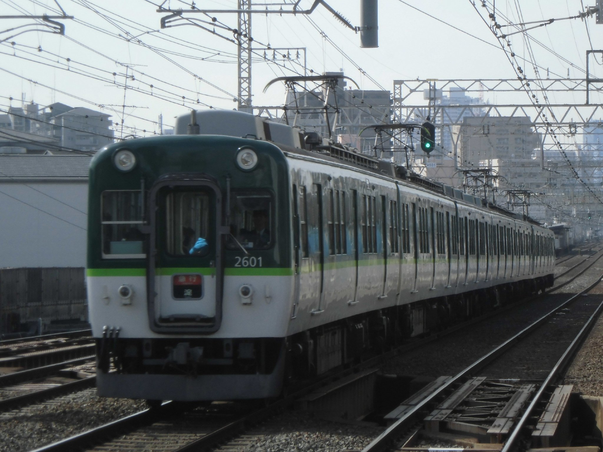 京阪2600系2601F